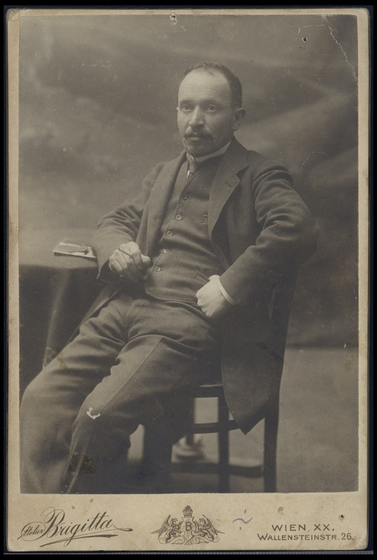 תצלום דיוקן יצחק אייזיק לובצקי: הדפסים בגוני חום, 10X14.5 ס"מ, בתבנית Cabinet card, הופק בעיר וינה. נשלח גם למערכת כתב העת "השלח", לשם פרסום בגליון היובל, 1912, ועל כן יש לשער כי הוא הופק סמוך לזמן זה. תצלום זה לא נכלל, בסופו של דבר, בלוח דיוקנאות הסופרים שיצא לאור.